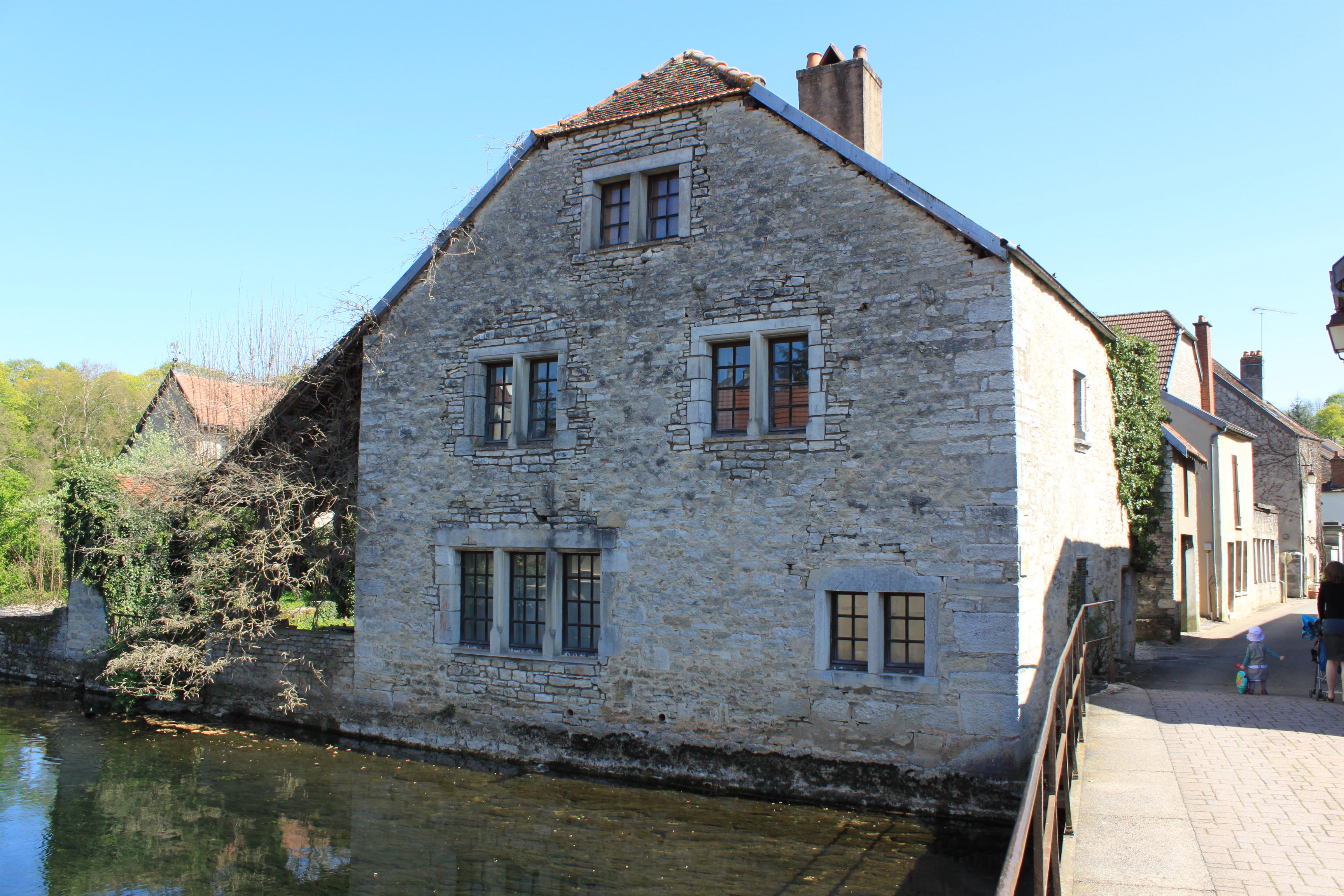 Bèze, Bourgogne, FRANCE